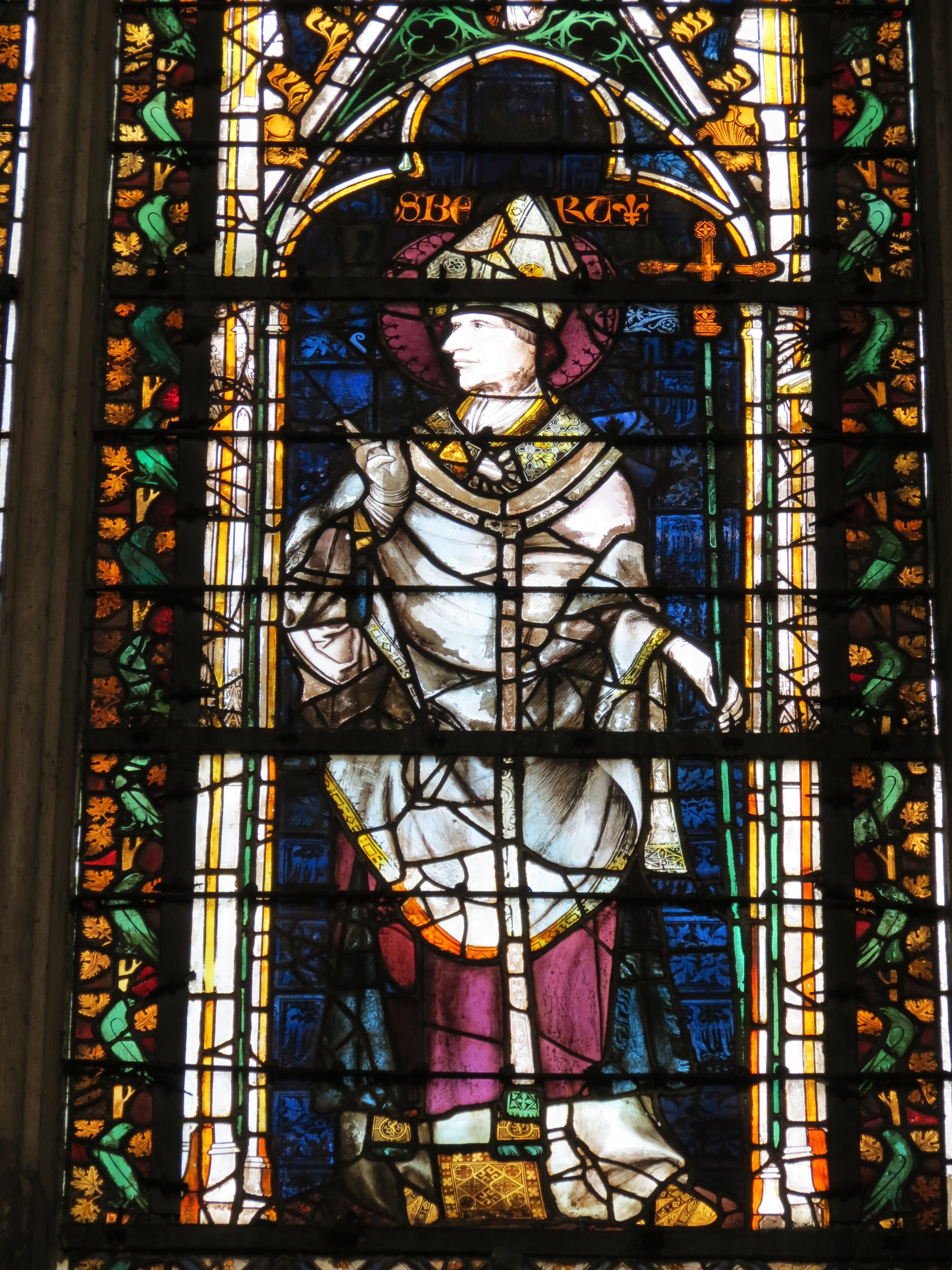 Vitrail de Saint-Ansbert.